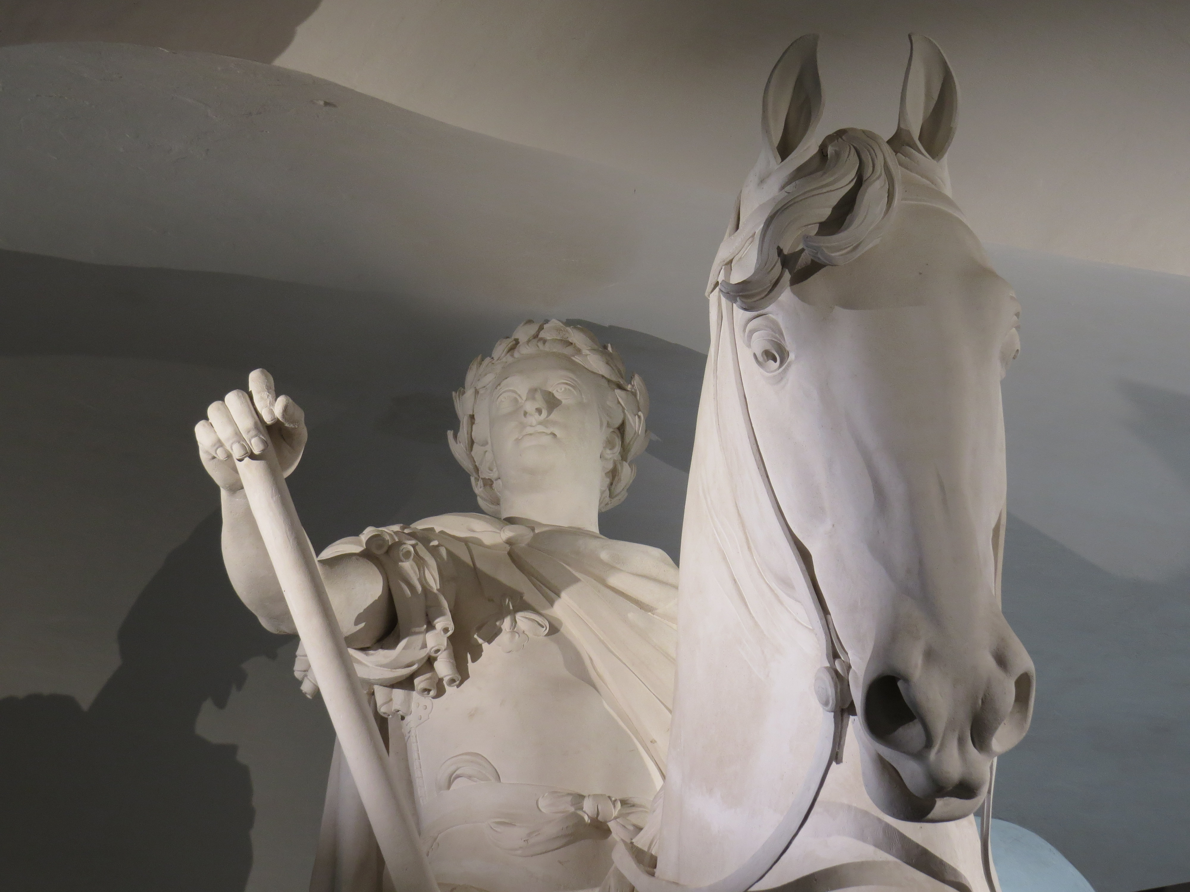 Detalje fra Jacques Salys statue af Frederik V af Danmark og Norge (gips), Kongernes Lapidarium, København